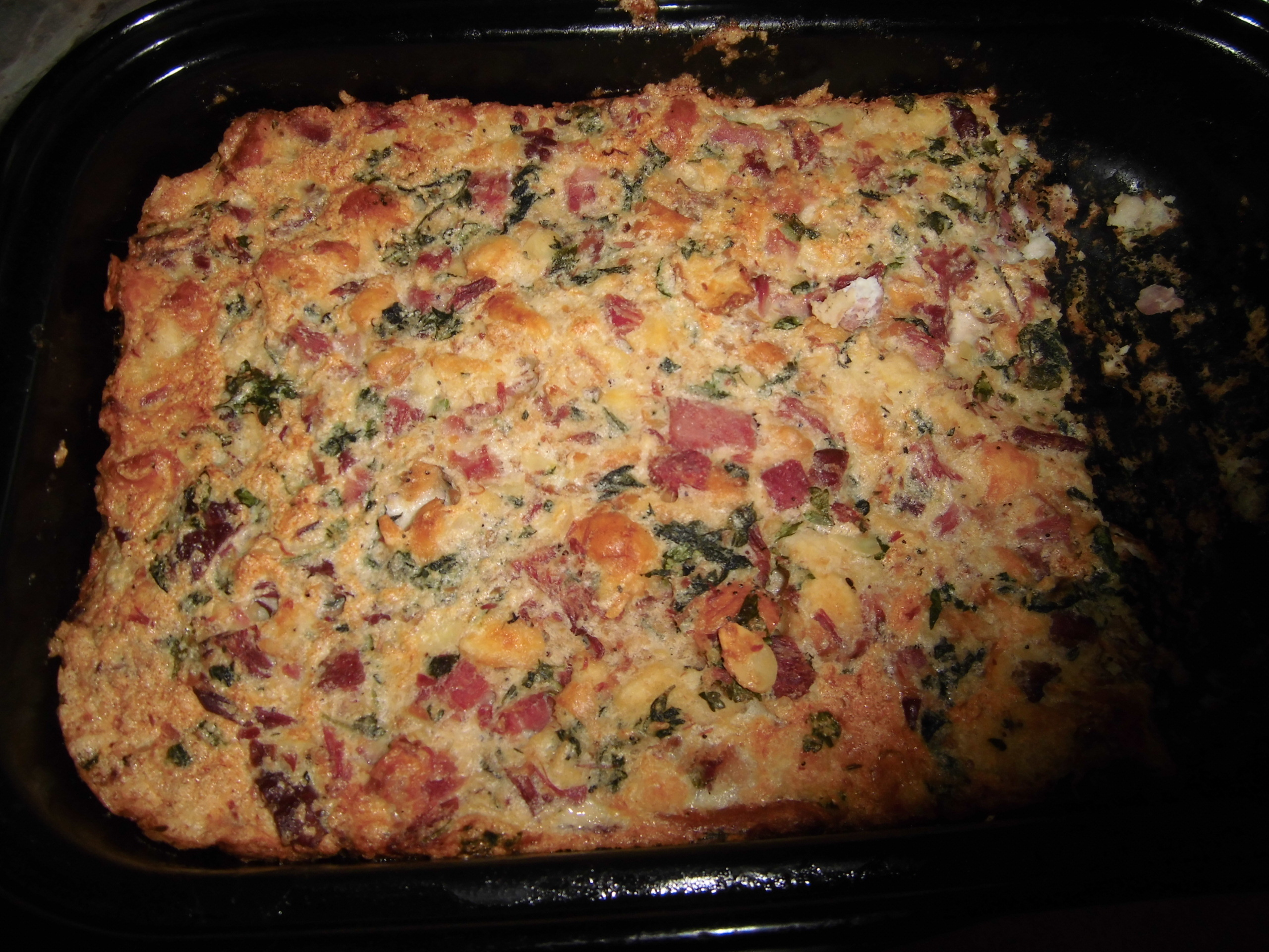 Velikonoční sekaná s kopřivami